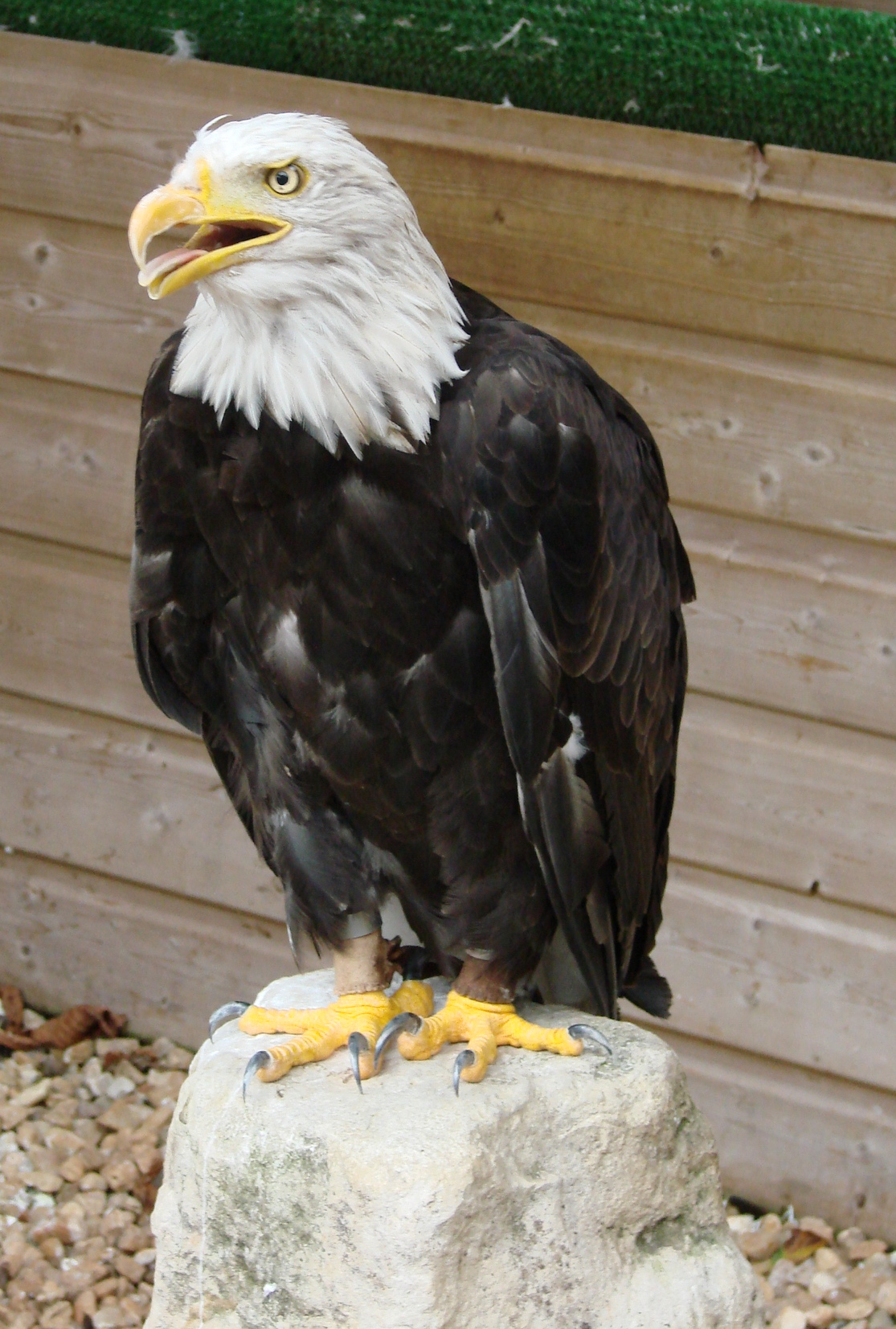 Pygargue femelle de 21 ans. Fauconnerie des Milandes.